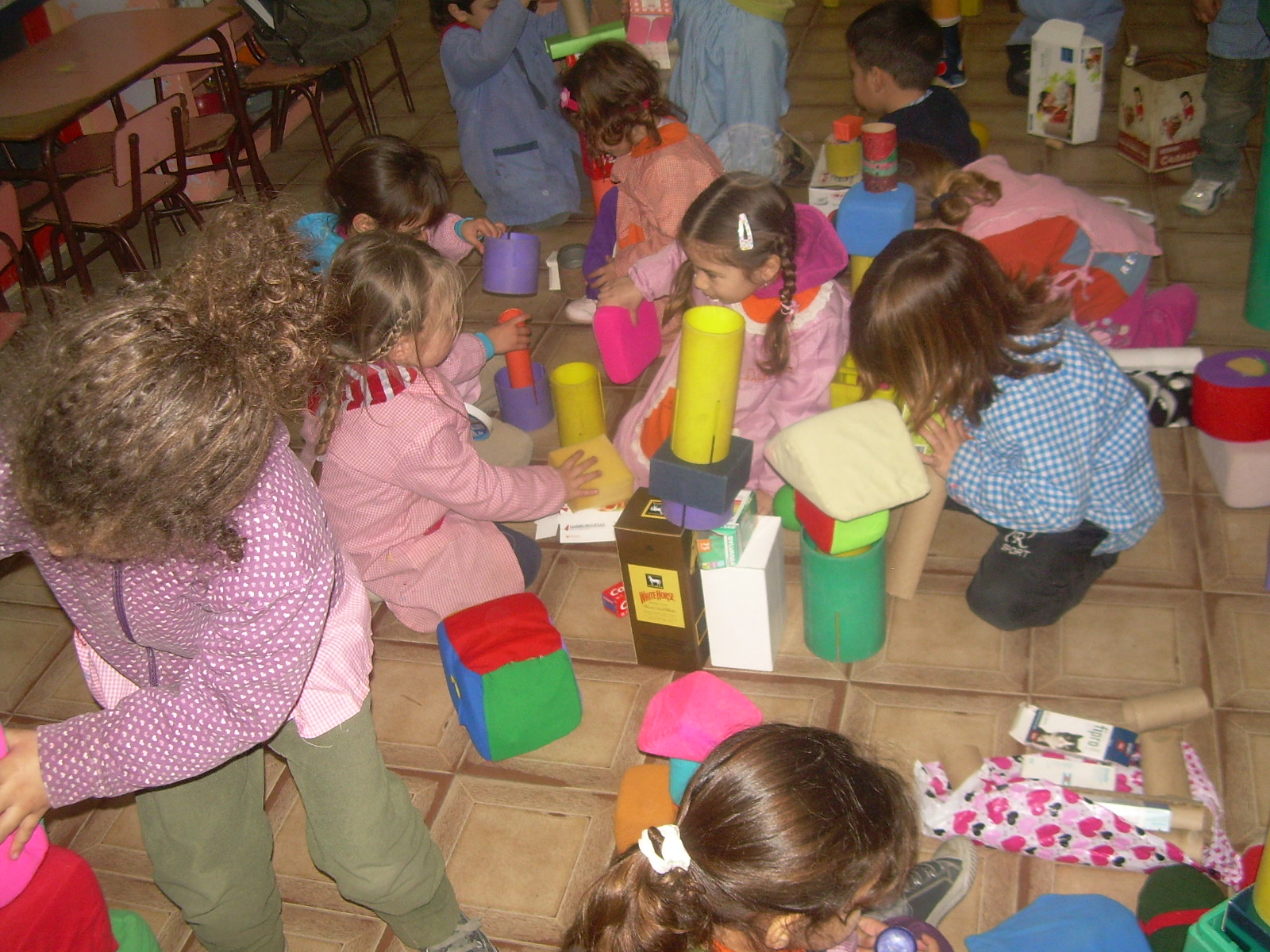 Niños jugando, construyendo con bloques y objetos